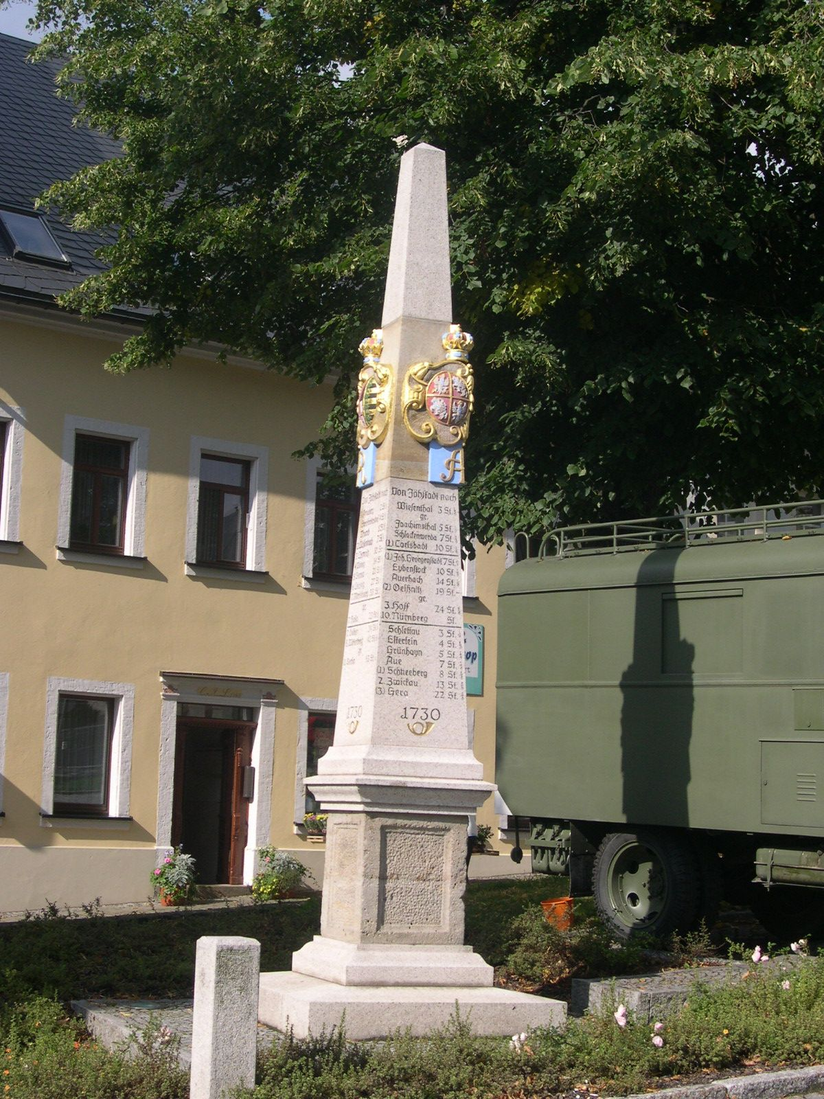 Kursächsische Postmeilensäule auf dem Markt von Jöhstadt, Sachsen